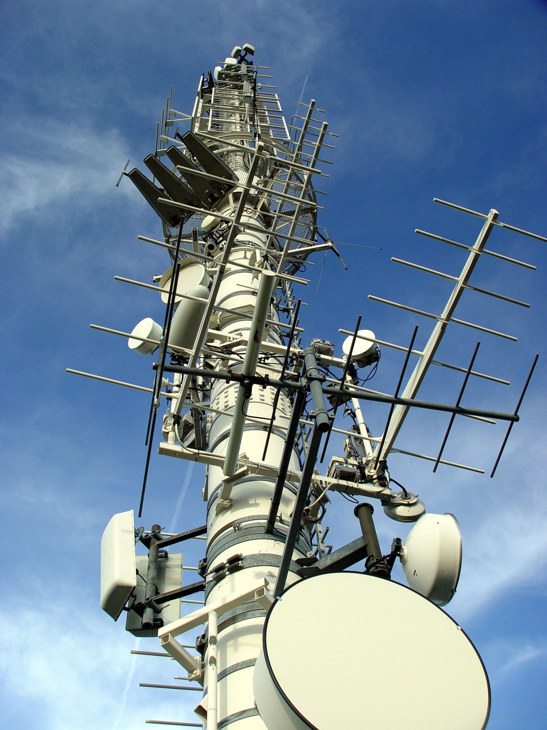 Motiv: Sendemast am Merkur in Baden-Baden. Fotografiert von Martin Dürrschnabel Kamera: Sony DSC-F717